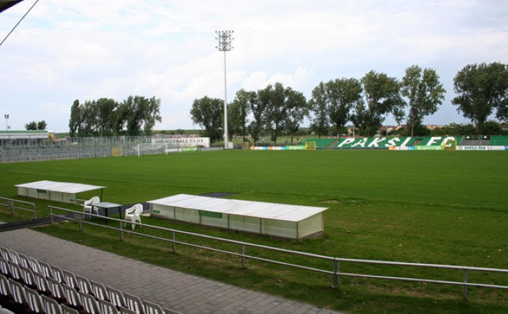 Paks stadionja.